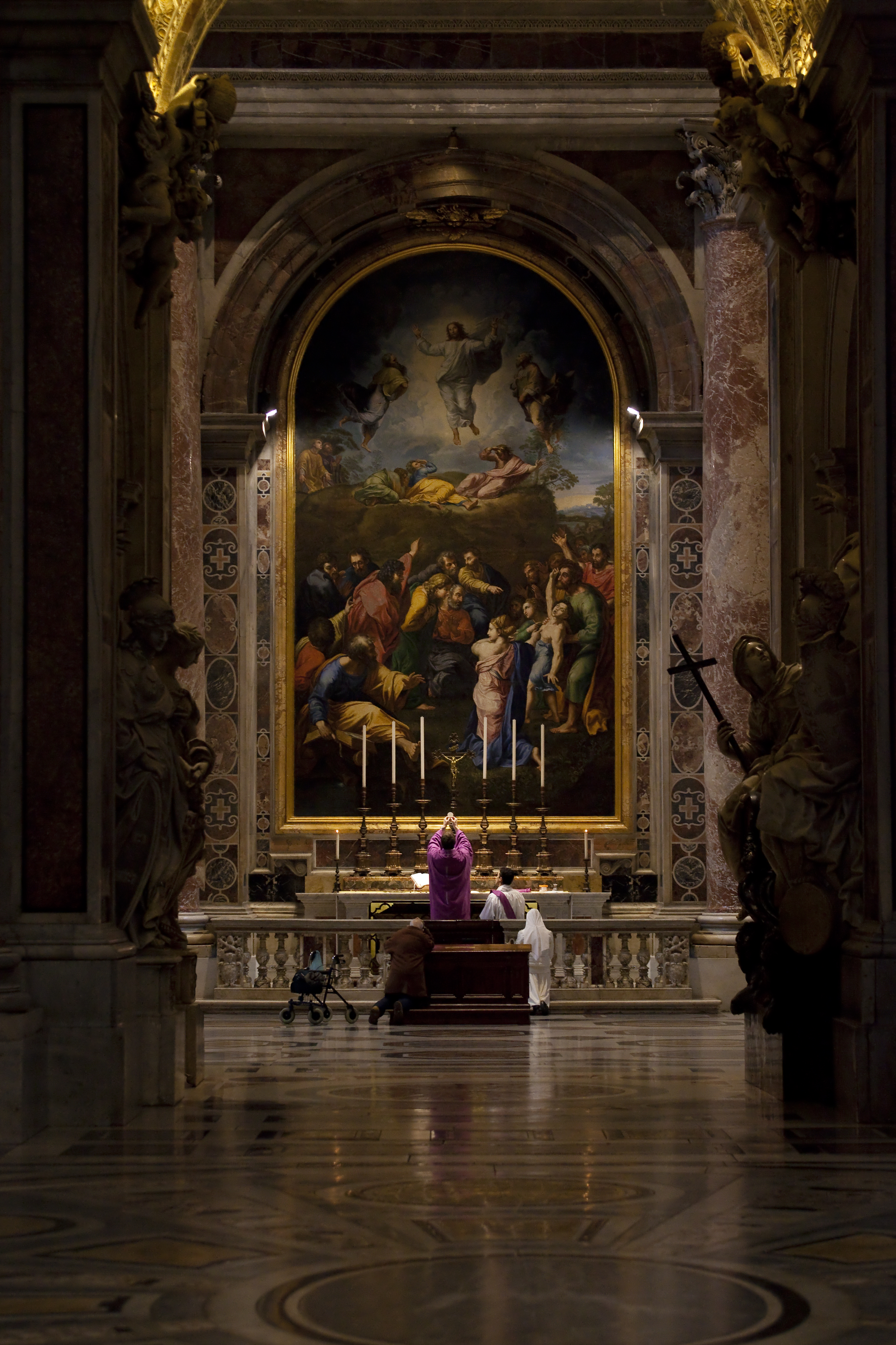 Transfiguration als Mosaik in St. Peter, Rom